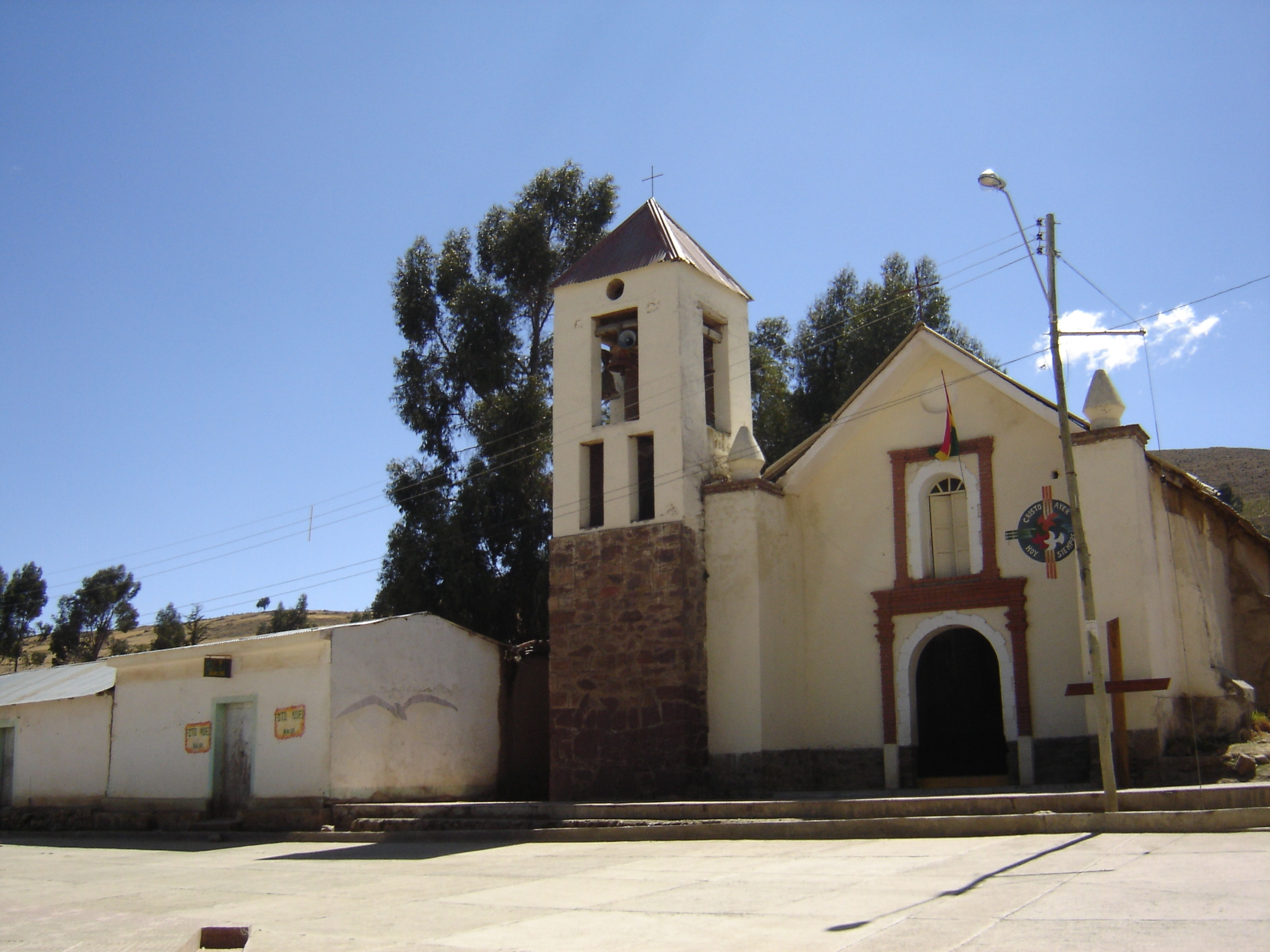 Fachada del Templo Parroquial Santa Bárbara de Vacas, ubicada en la acera norte de la Plaza 4 de diciembre.